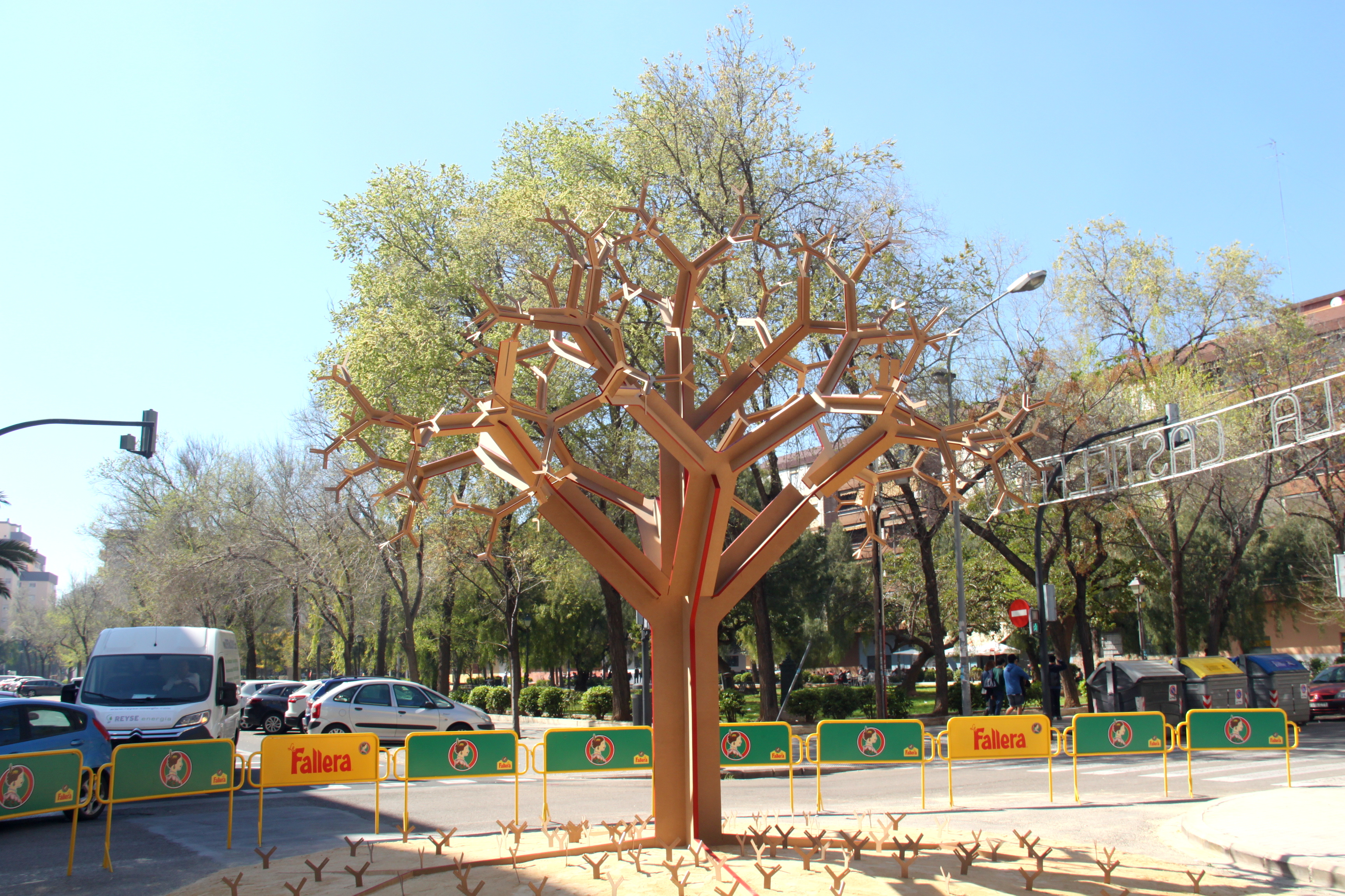 Falla Castielfabib - Marqués de Sant Joan 2017 This is a photography of a Folklore festival in Spain (Wikidata id Q1143768).